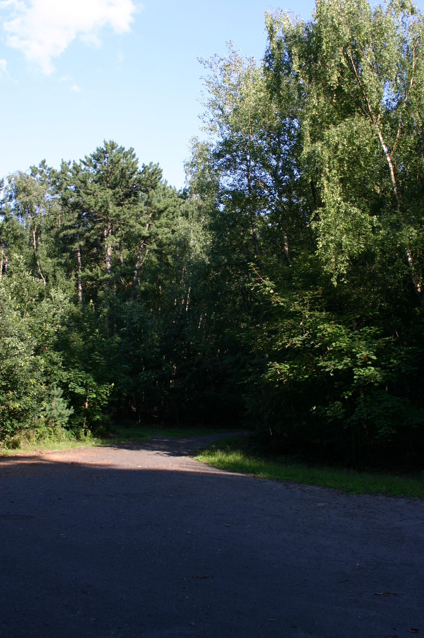 Přírodní amfiteátr na kopci Ressl u Mostu